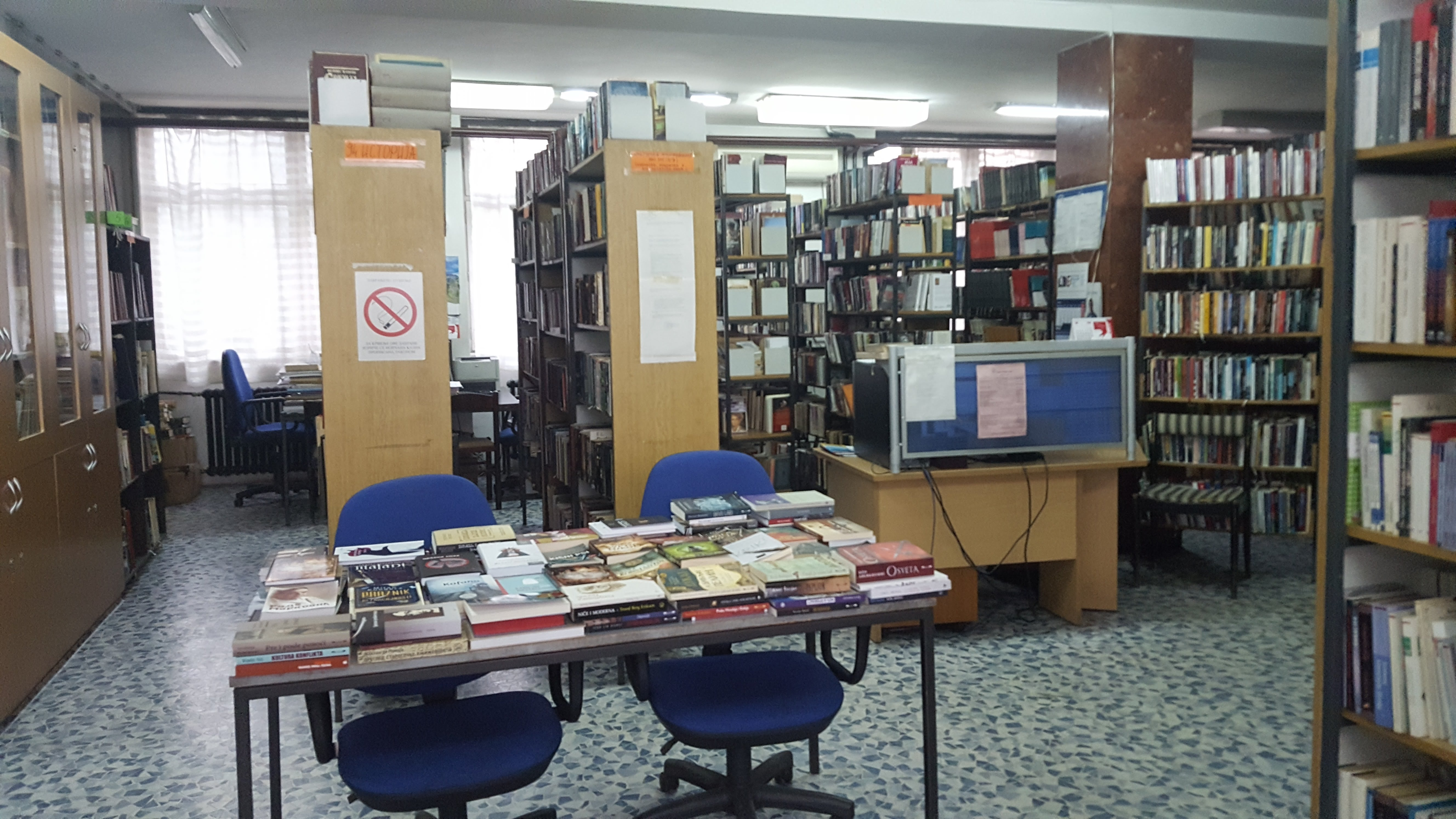 Biblioteka "Despot Stefan Lazarević" Mladenovac